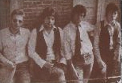 Indiana (banda española) en 1976